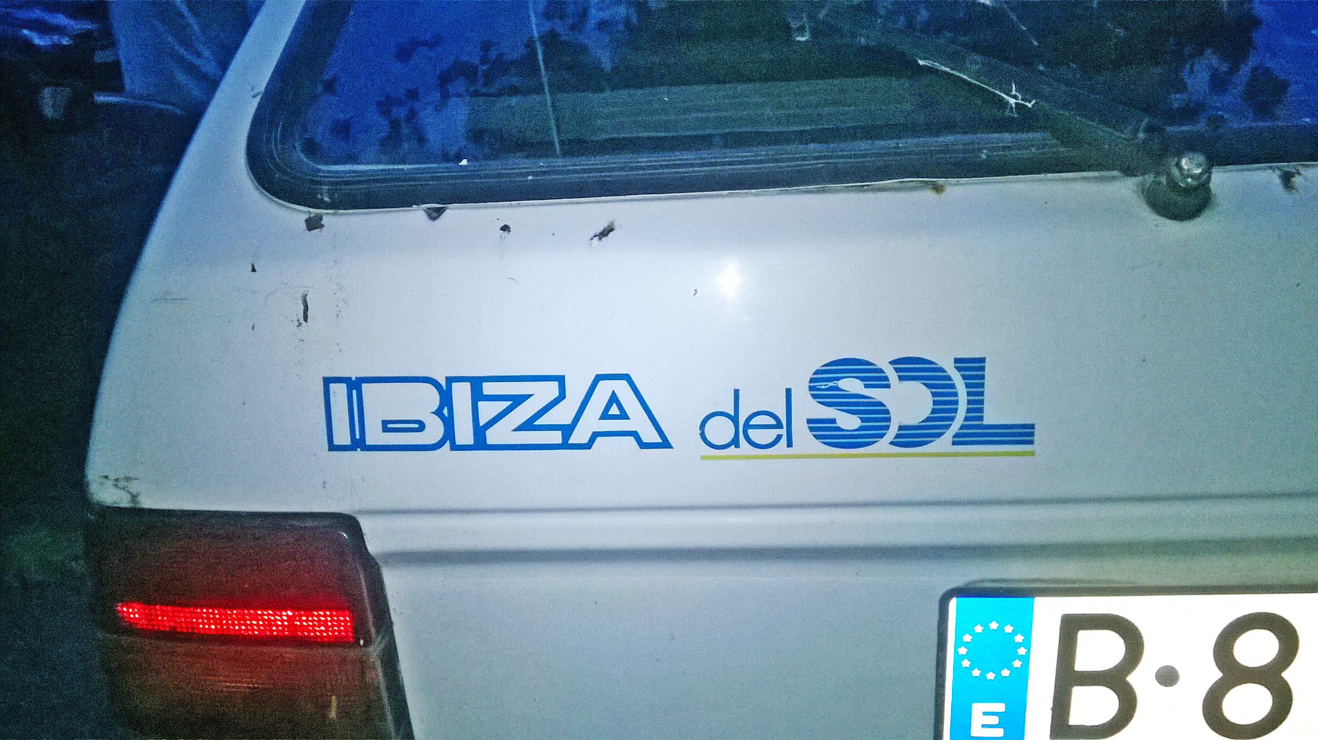 SEAT Ibiza del Sol, versión característica por su carrocería completamente blanco y contar con techo solar, la versión, contaba con vinilos específicos, esta versión seria actualizada en 1988 con una nueva redición con un nuevo decorado que contaba con nuevos vinilos en color azul, para diferenciarse de la antigua versión del sol de 1986.